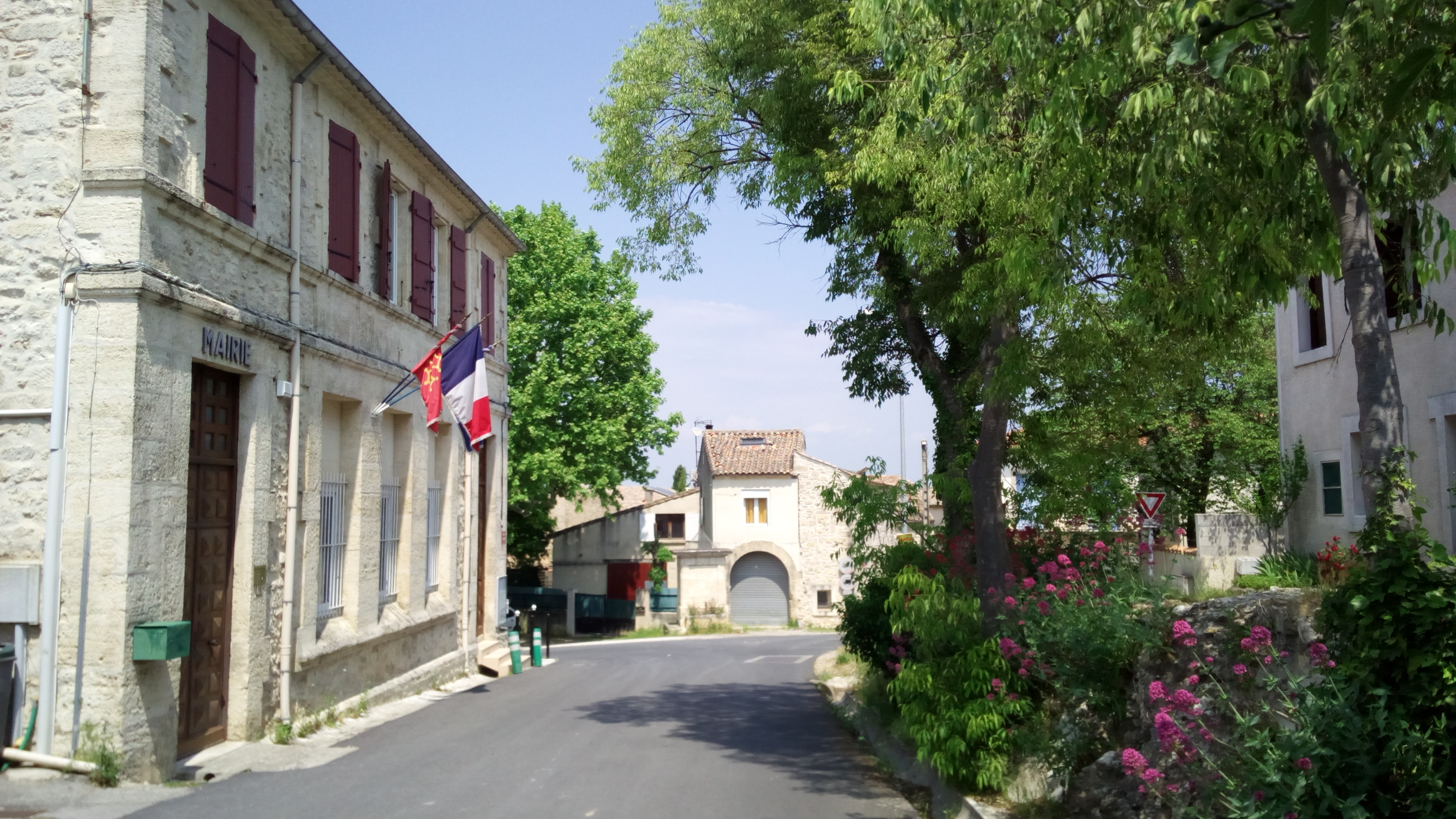 Commune de Saint-Jean-de-Cornies